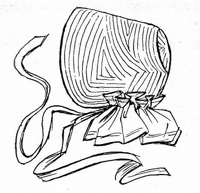 Volkspeledrag: kappie